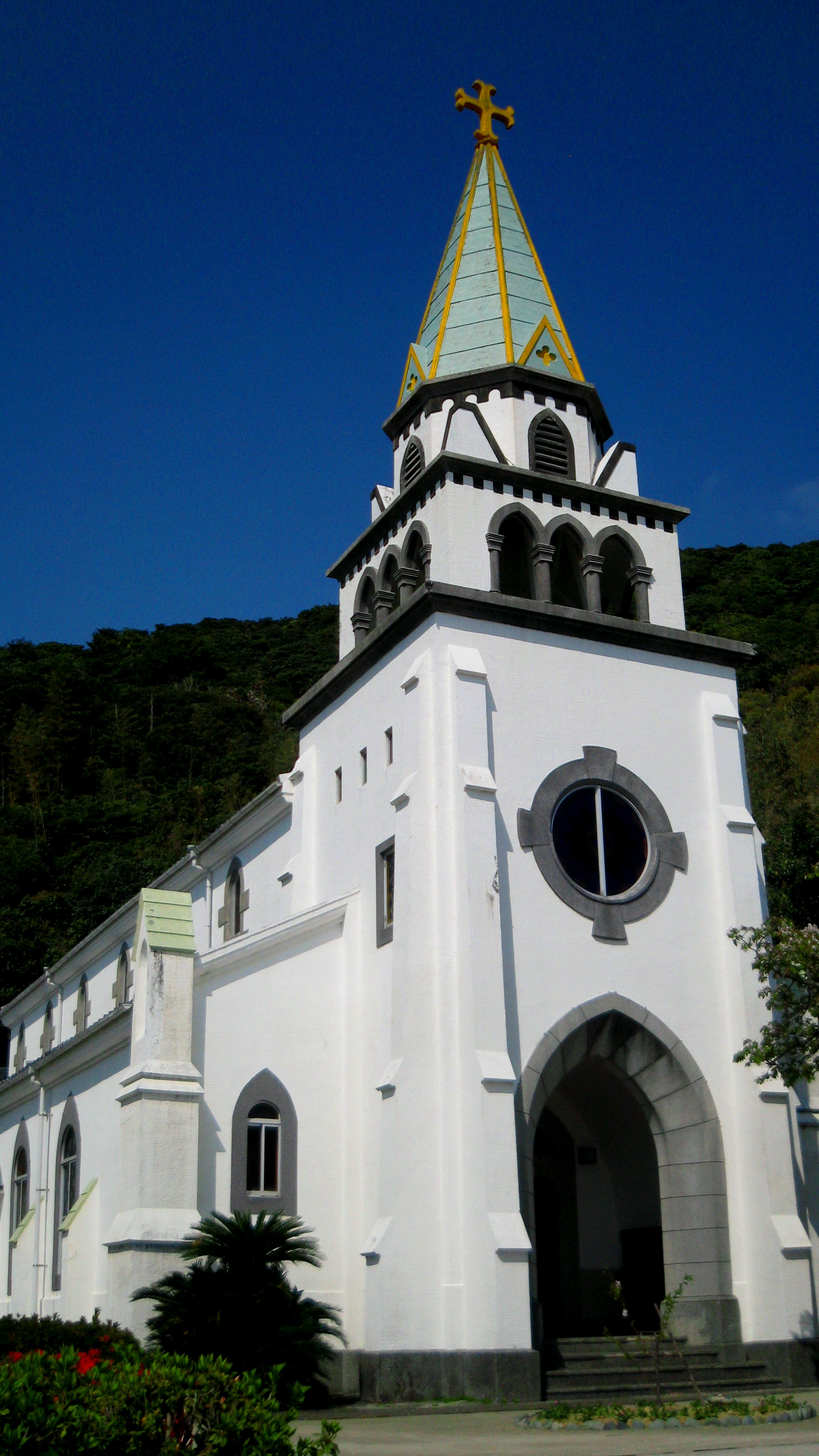 五島市田ノ浦町（久賀島浜脇教会）